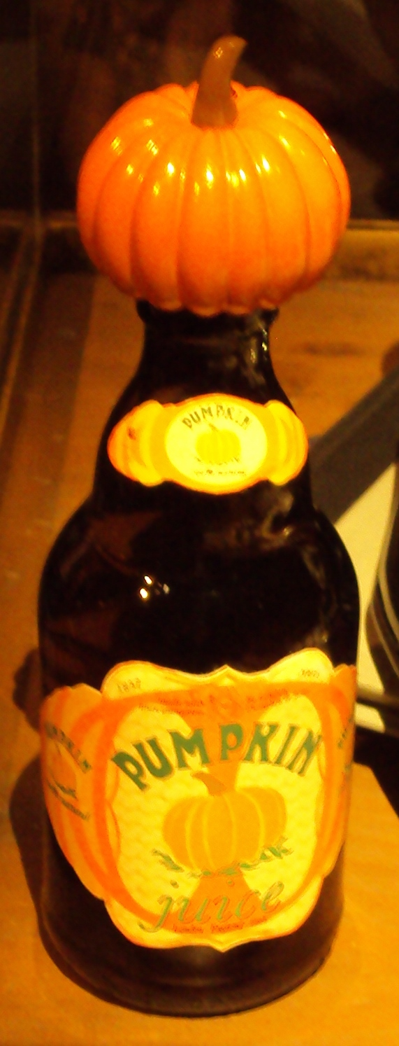 Flesje Pompoensap (Engels: Pumpkin Juice) tijdens Harry Potter: The Exhibition in Brussel (België)